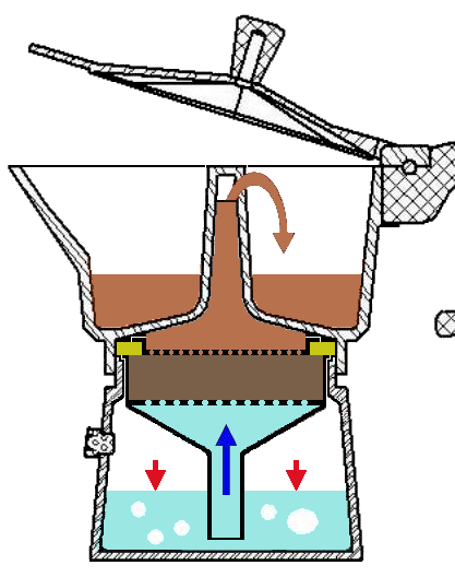 Чертёж поперечного сечения гейзерной кофеварки.